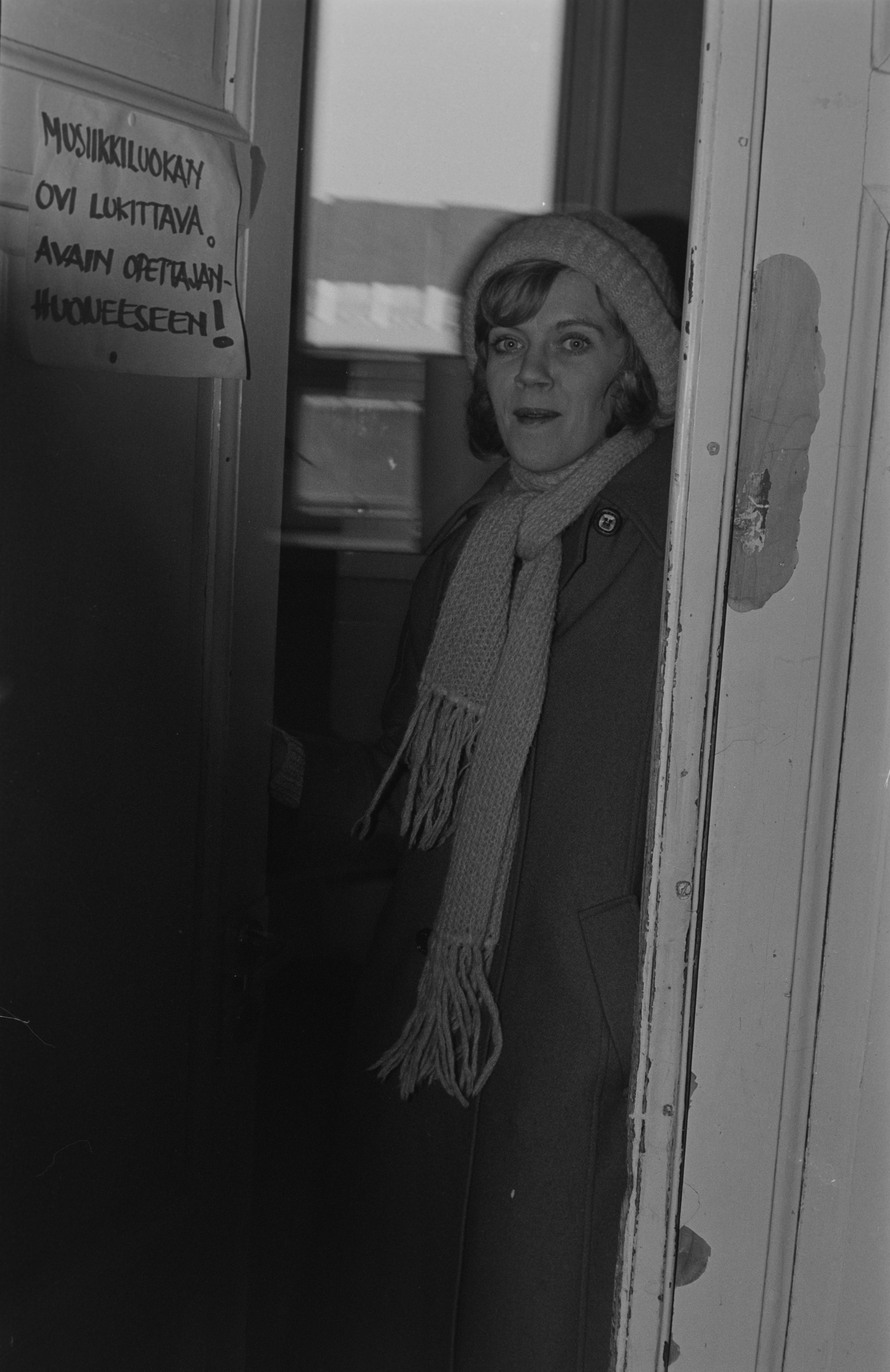 Marjukka Riihimäki musiikinopettajana Töölön yhteiskoulussa.